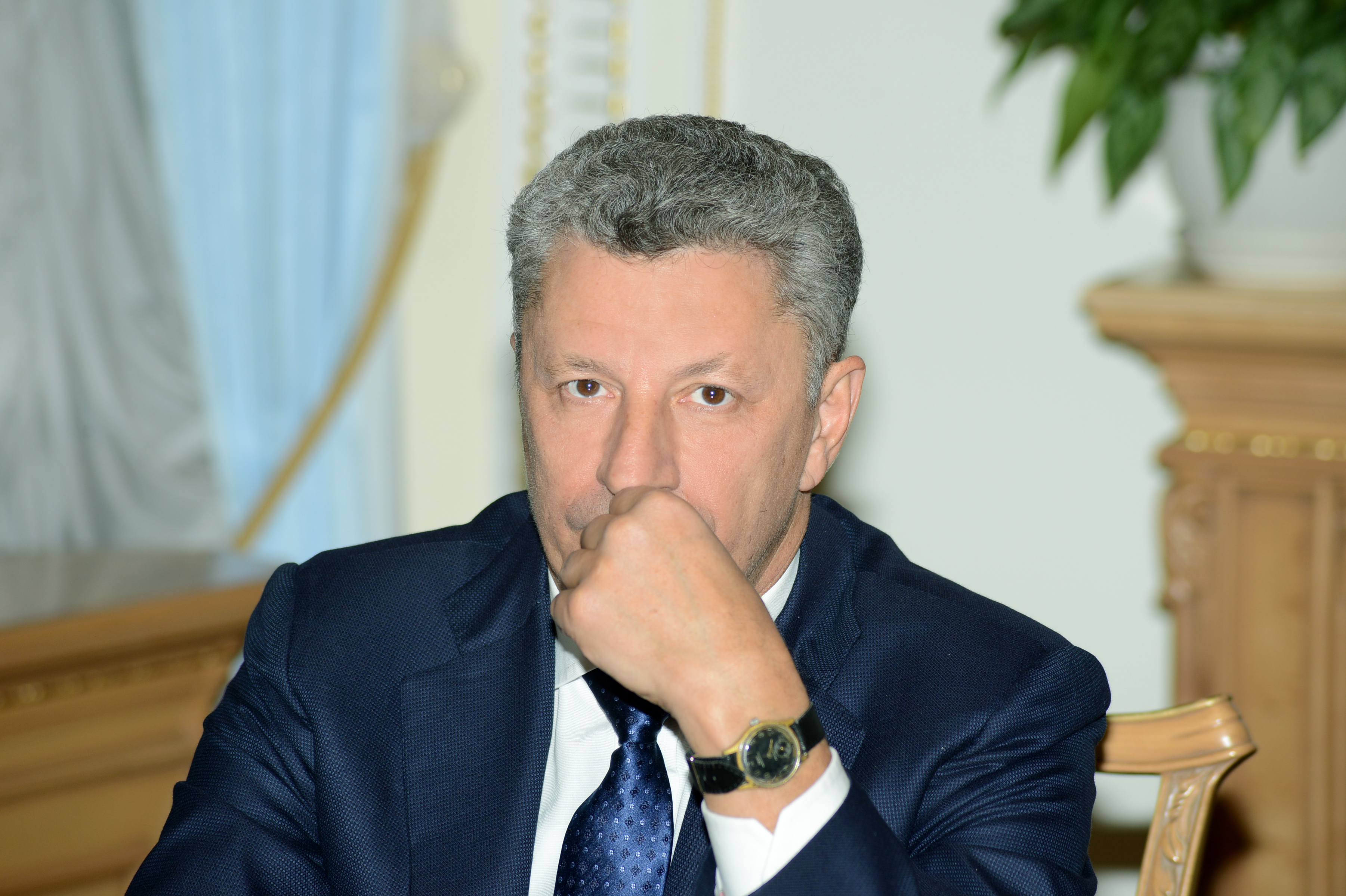 ВЕРХОВНА РАДА УКРАЇНИ 2015 фотограф Вадим Чуприна